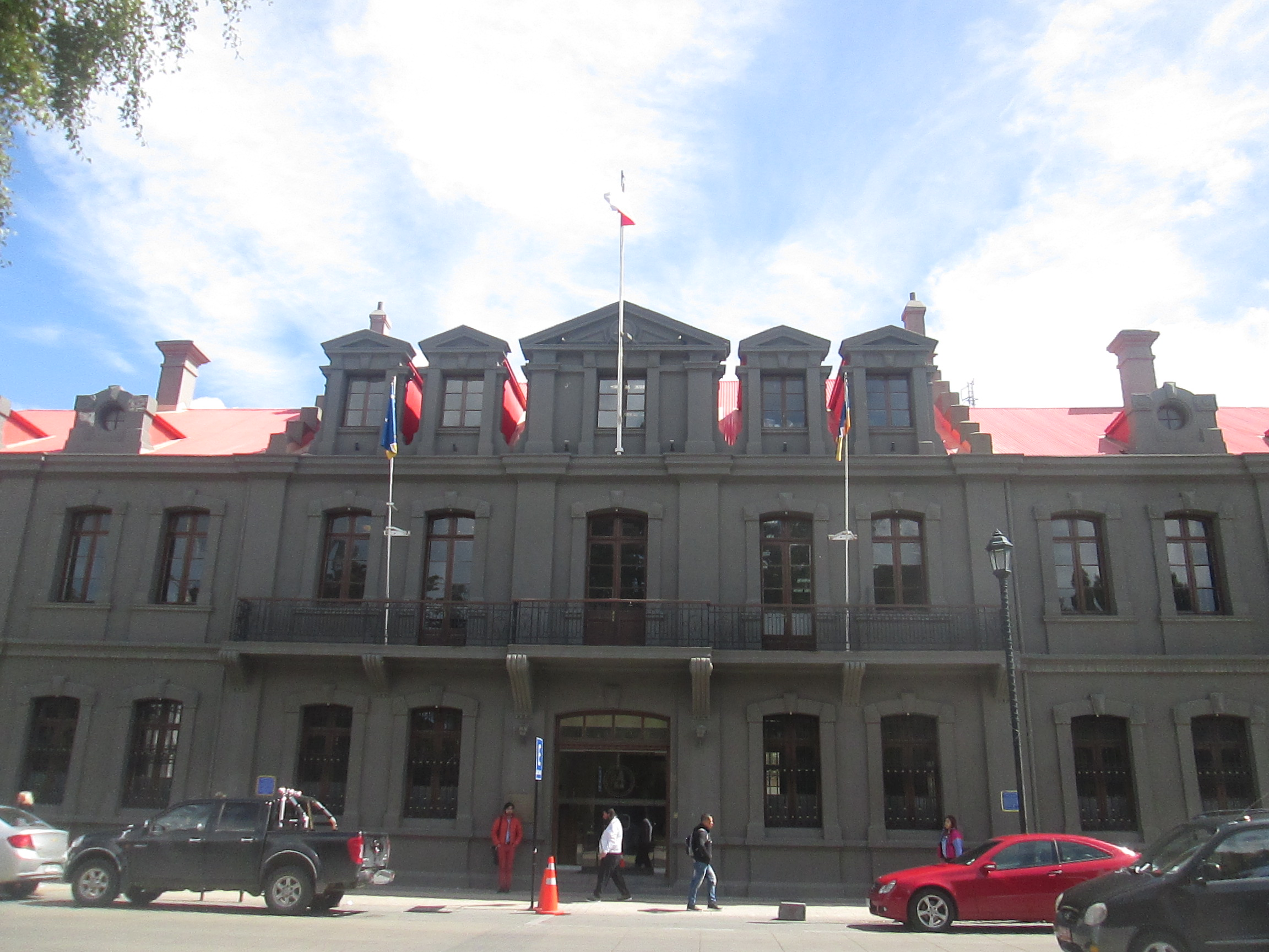 Edificio donde funciona la Intendencia de la Región de Magallanes.